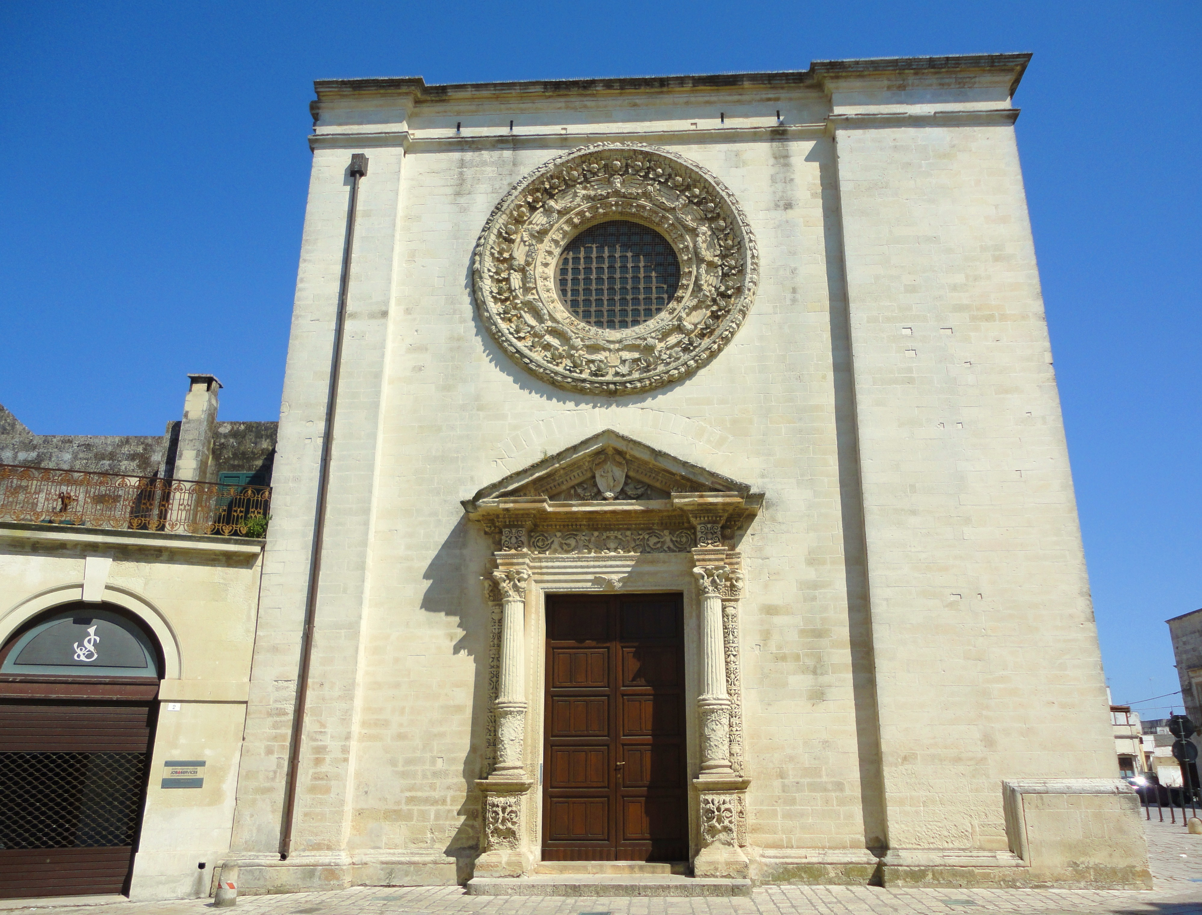 Chiesa Madre di Minervino di Lecce